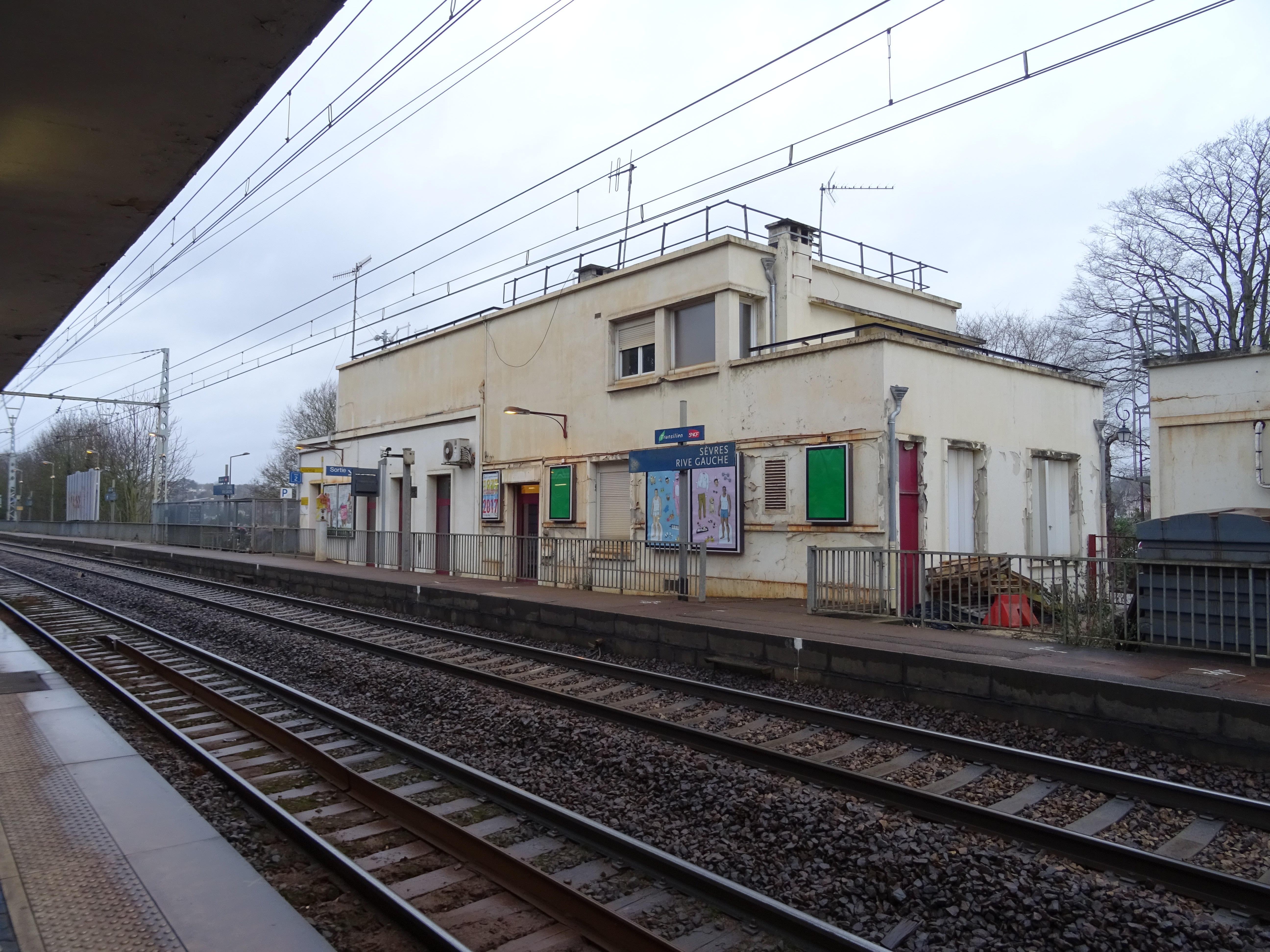 Bâtiment voyageur de la gare de Sèvres-Rive-Gauche sur la ligne du Transilien N.